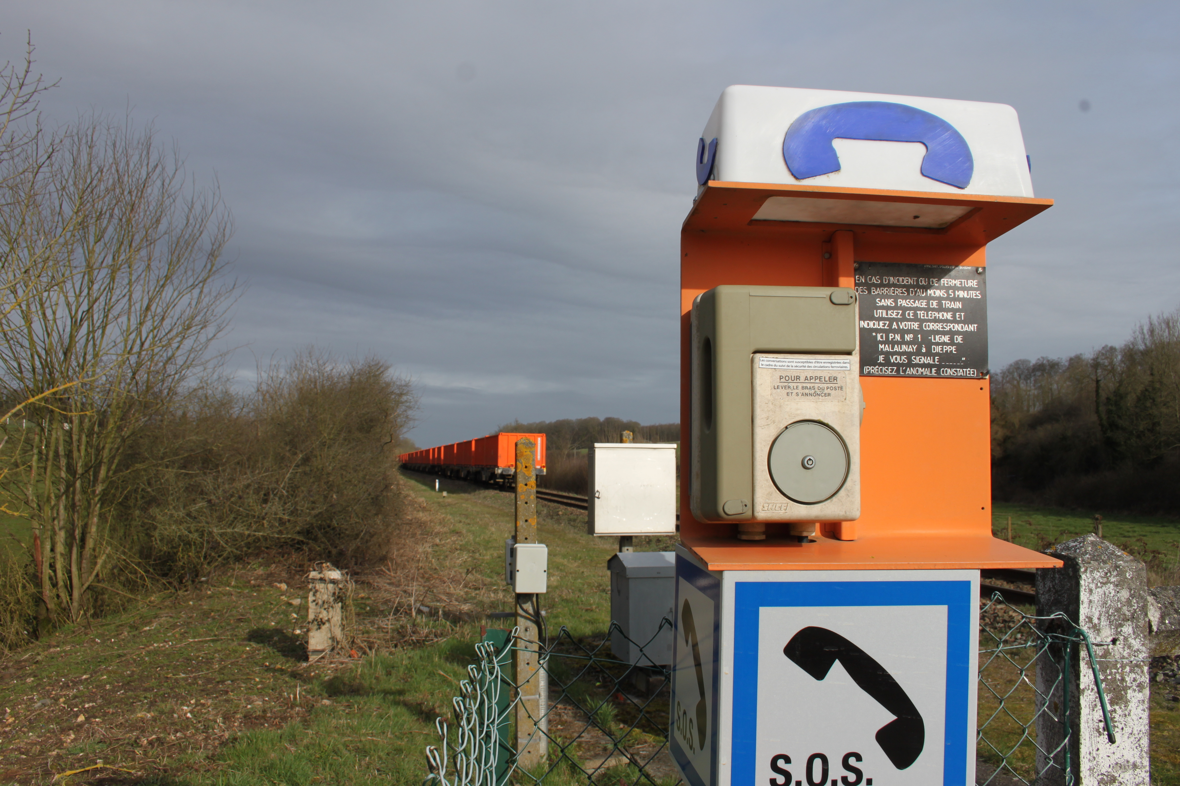 Ligne de Malaunay à Dieppe, téléphone d'appel S.O.S. du P.N.n°1, franchis par un train (Colas-Rail) de wagons porte-bennes à destination du site de Rouxmesnil-Bouteilles pour y charger de la terre, commune de Saint-Victor-l'Abbaye(76) .